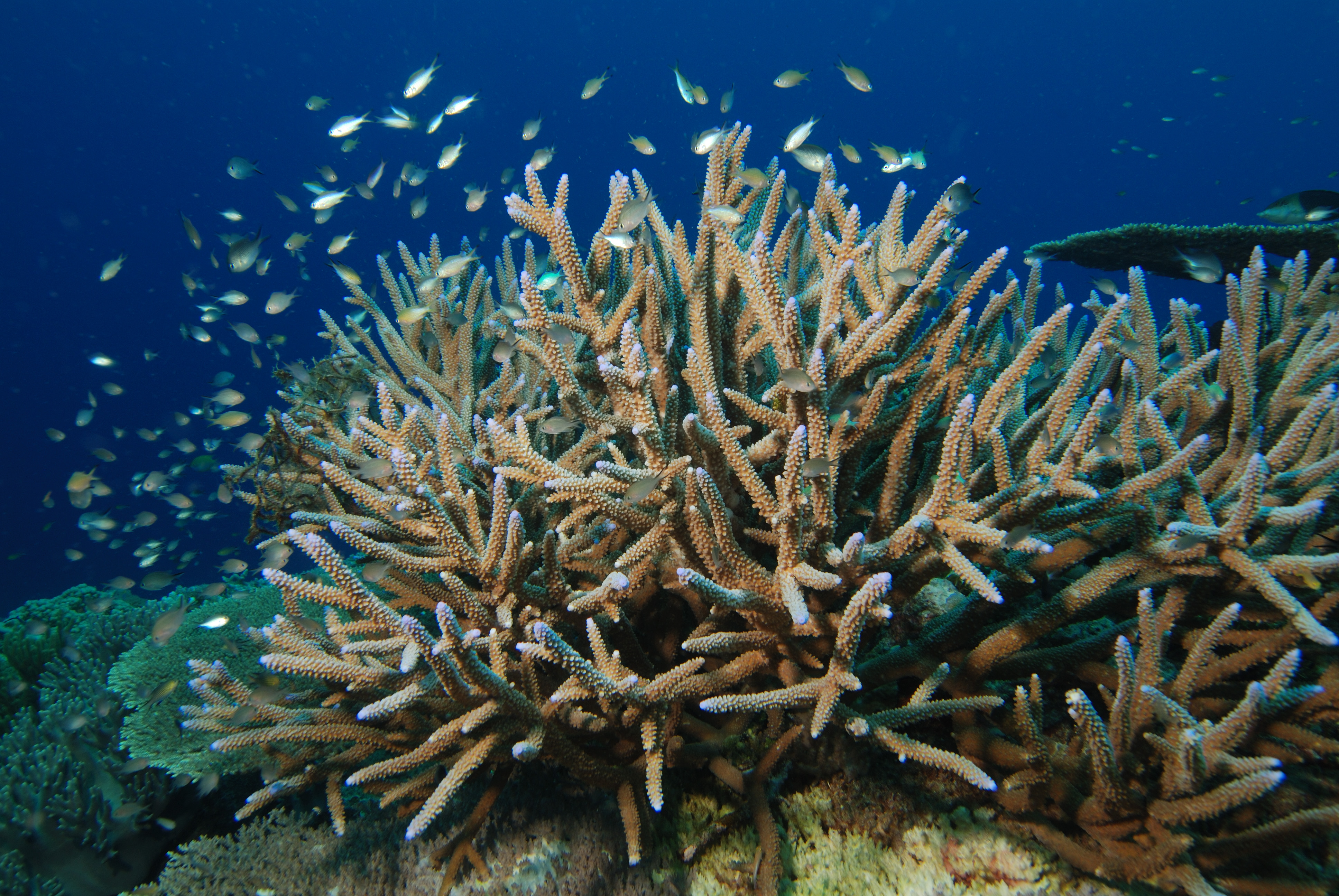 Hertshoorn koraal